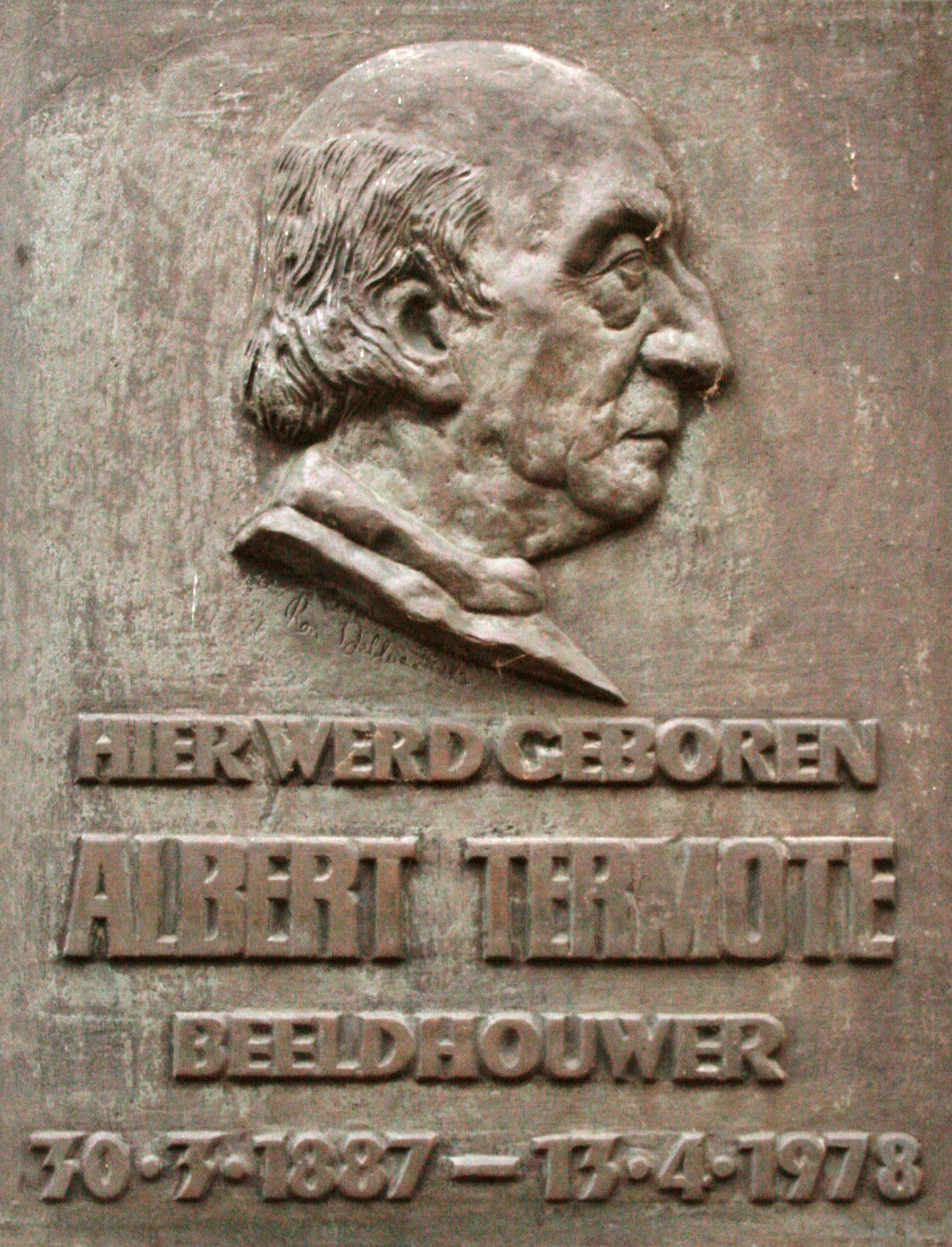 Cinema De Keizer 2012, Neerstraat 11, Lichtervelde